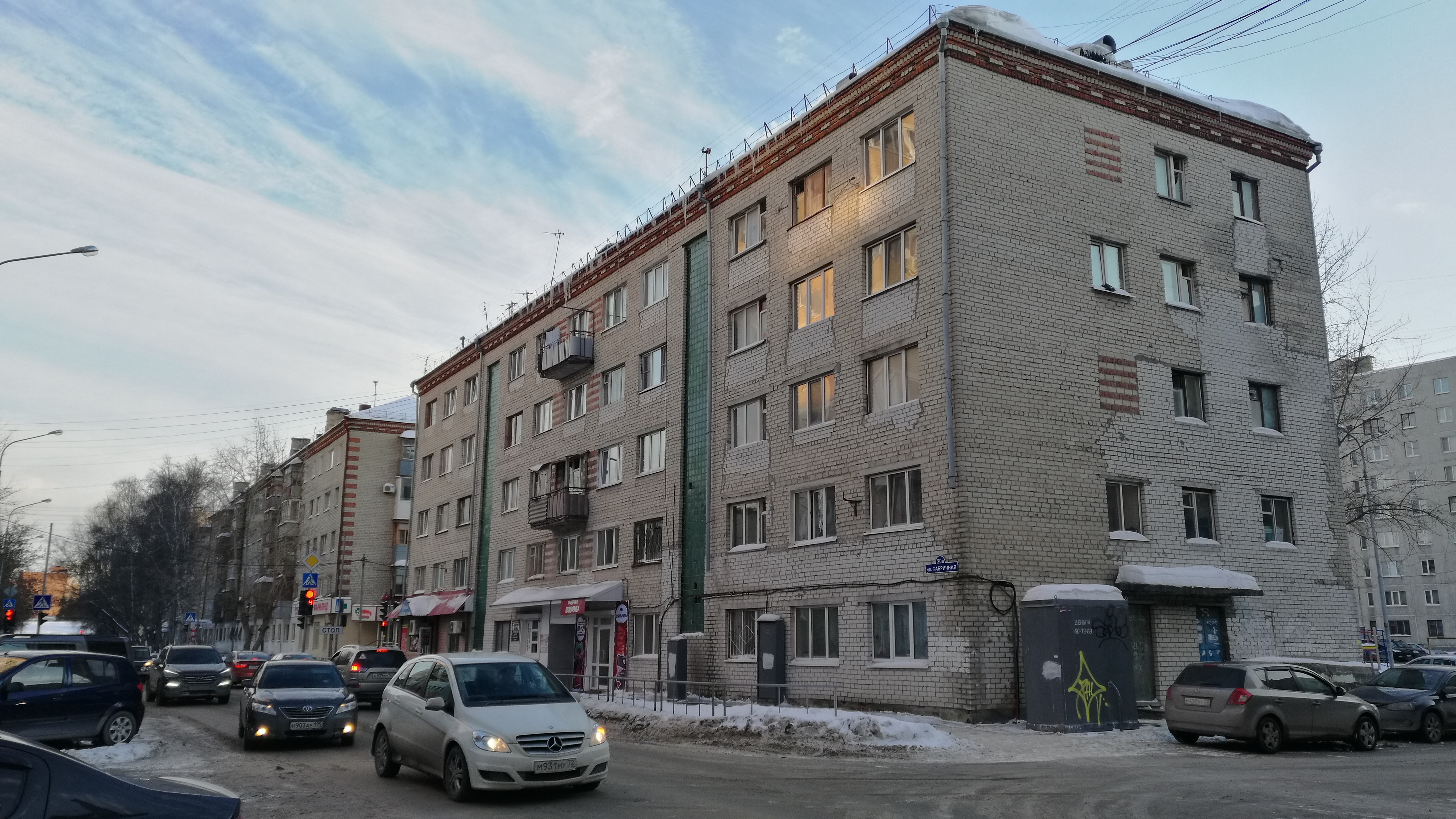 Komunloĝejo sur la strato Fabriĉnaja 20a. Tjumeno, Rusio.